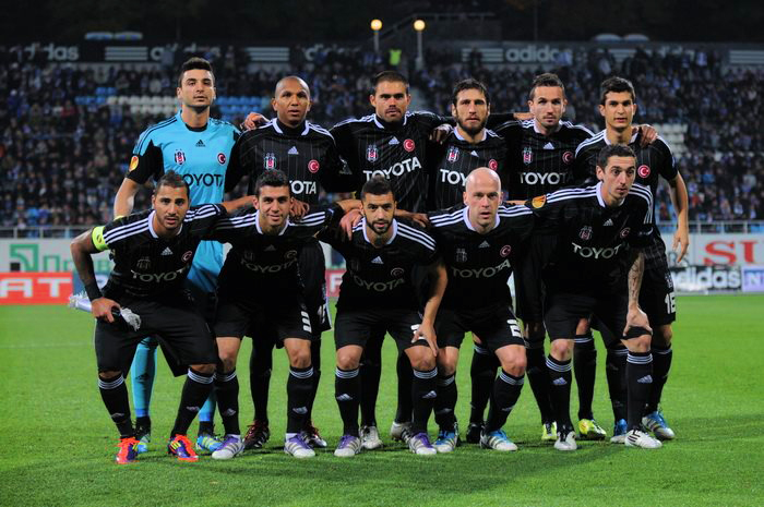 21 Ekim 2011 tarihinde Dinamo Kiev ile oynanan maçta Beşiktaş ilk 11'i.